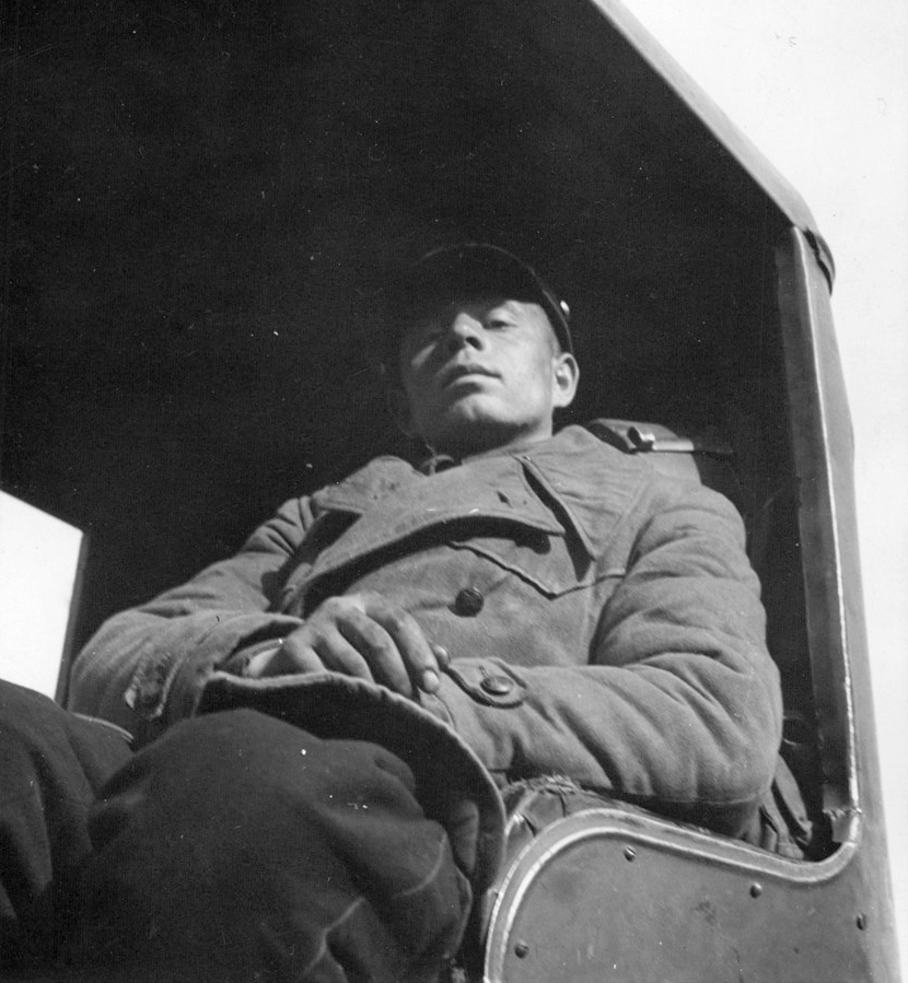 En sovjetisk politruk tagen till fånga vid Porlampi söder om Viborg.